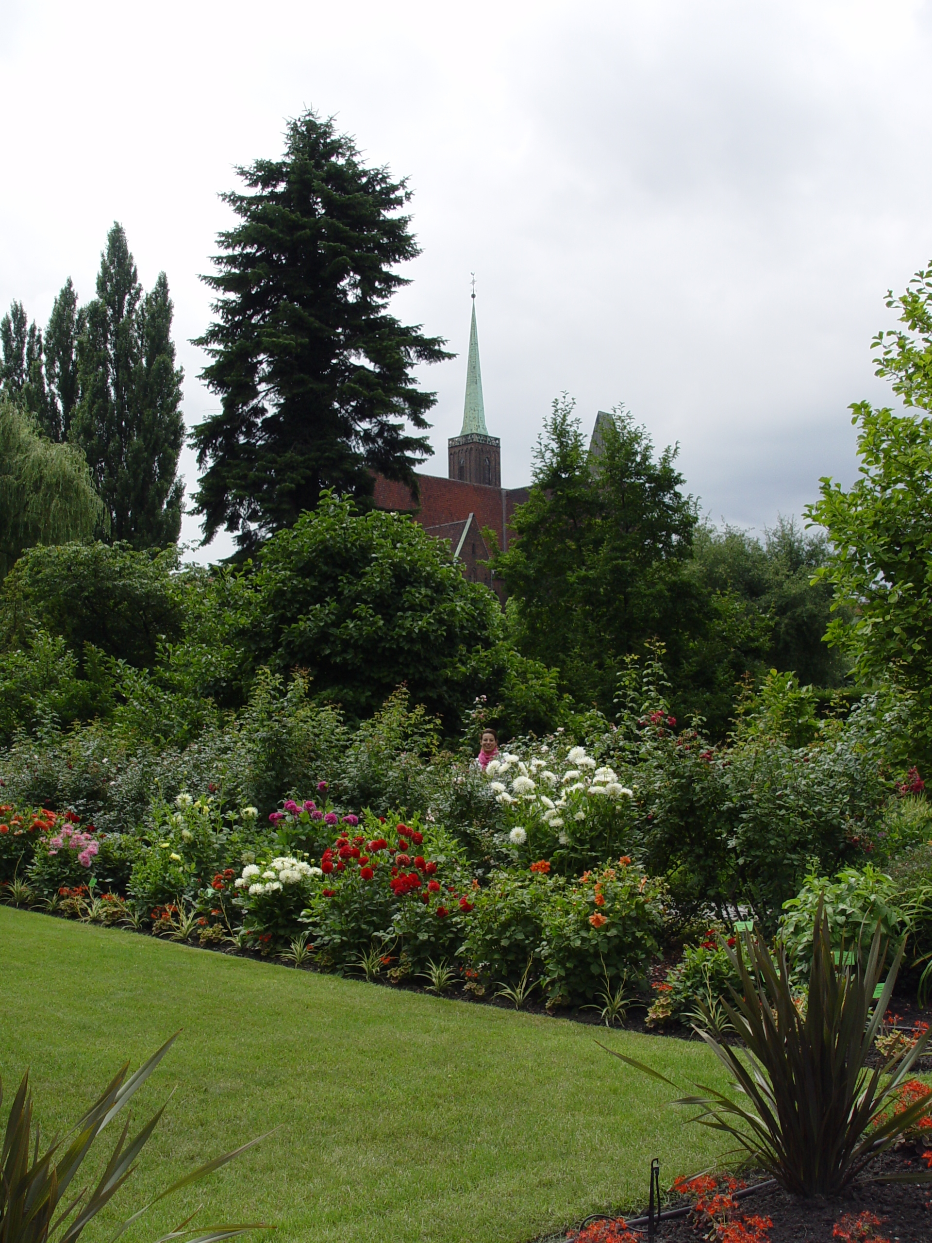 Ogród Botaniczny położony między ul. Sienkiewicza a ul. Kanonią Kanonia 6/8, Sienkiewicza, Miasto Wrocław - Śródmieście